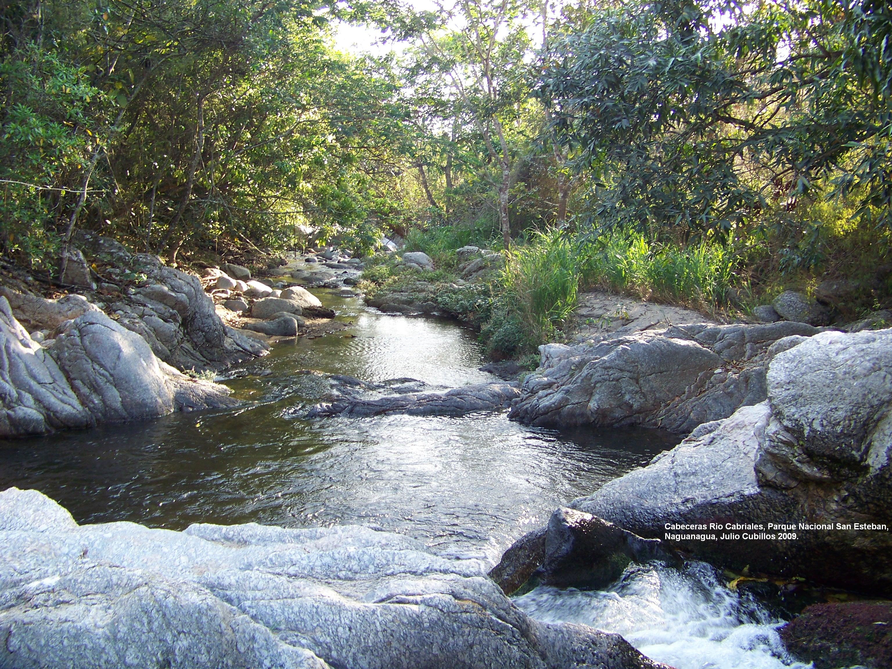 Imagen tomada en las cabeceras del río Cabriales, no en su naciente principal, pero una parte muy superior a la del valle de Naguanagua, muy arriba en la montaña. Parque Nacional San Esteban, Naguanagua, Estado Carabobo, Venezuela.